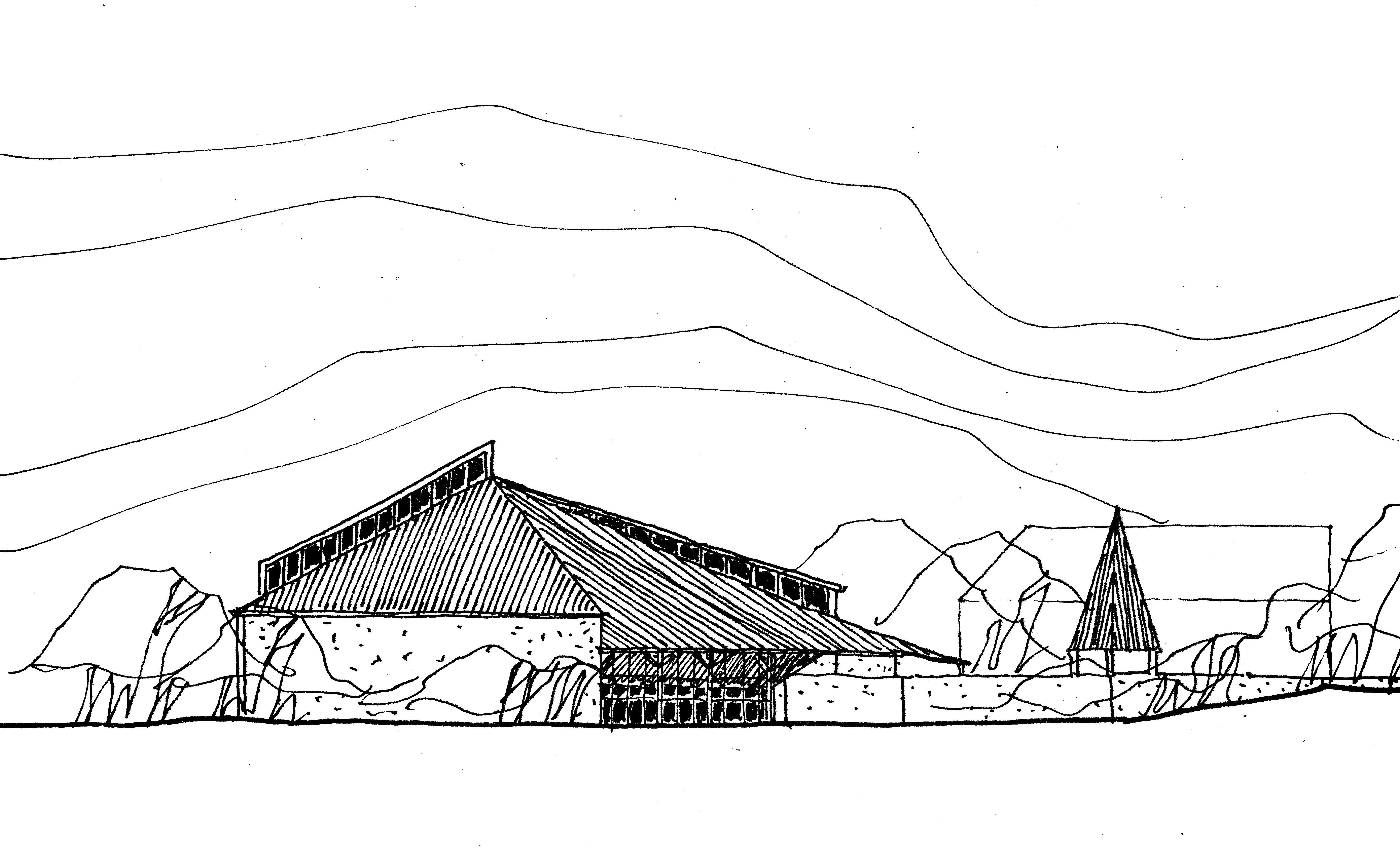 Die Zeichnung zeigt die Ansicht des ersten Entwurfes einer neuen Kirche in Regensburg, Oberisling